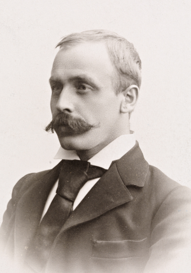 Tittel / Title: Portrett av Sigbjørn Obstfelder (1866-1900) Motiv / Motif: Visittkort. Dato / Date: 1900 Fotograf / Photographer: Atelier Francais (København) Sted / Place: Danmark, København Eier / Owner Institution: Nasjonalbiblioteket / National Library of Norway Lenke / Link: Bildesignatur / Image Number: blds_02362